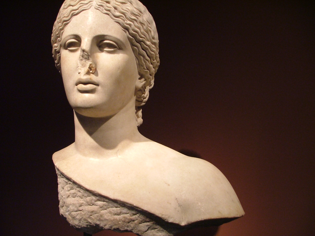 Cabeza de mármol de Venus se encuentra en las ruinas del antiguo teatro de Arles. Según algunos investigadores es una réplica de una obra original de Praxíteles Afrodita o Friné asociado. Museo de Arles antiguo